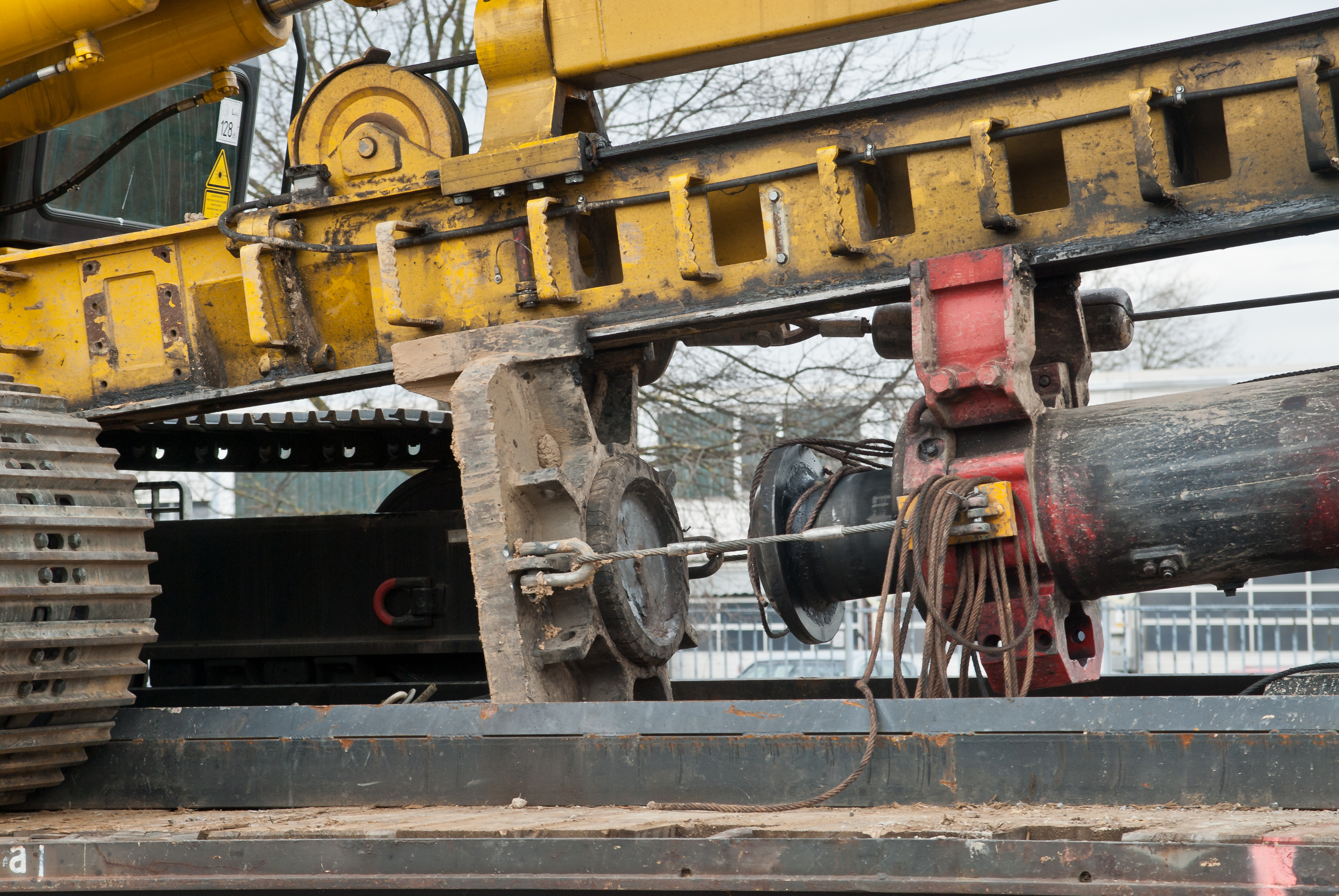 Schlagplatte und Detail des Dieselbären einer Ramme/eines Malters der Firma Delmag (in Transportstellung, verladen auf einem Eisenbahnflachwagen)